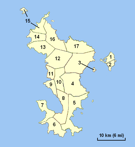 Carte administrative de Mayotte avec communes numérotées de 1 à 17 : Dzaoudzi Pamandzi Mamoudzou Dembeni Bandrele Kani-Kéli Bouéni Chirongui Sada Ouangani Chiconi Tsingoni M'Tsangamouji Acoua Mtsamboro Bandraboua Koungou